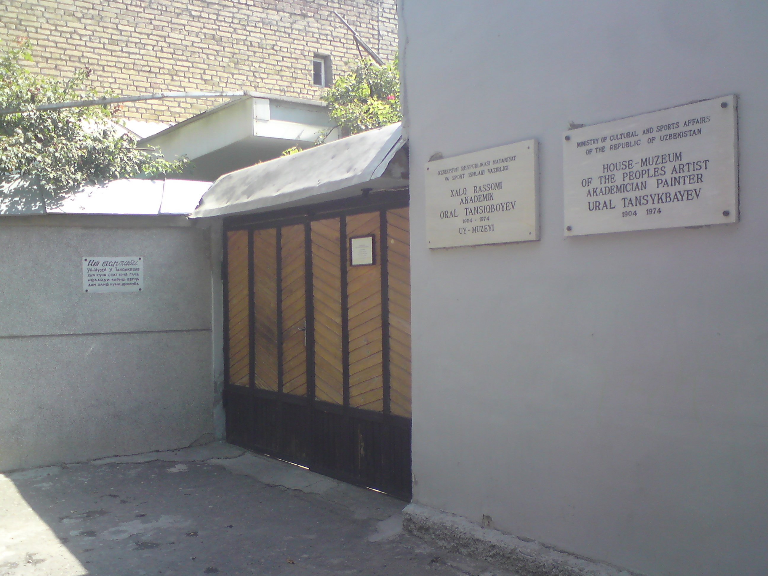 Вход в дом-музей Урала Тансыкбаева, народного художника СССР. Узбекистан, Ташкент, массив Буз-1, дом-5